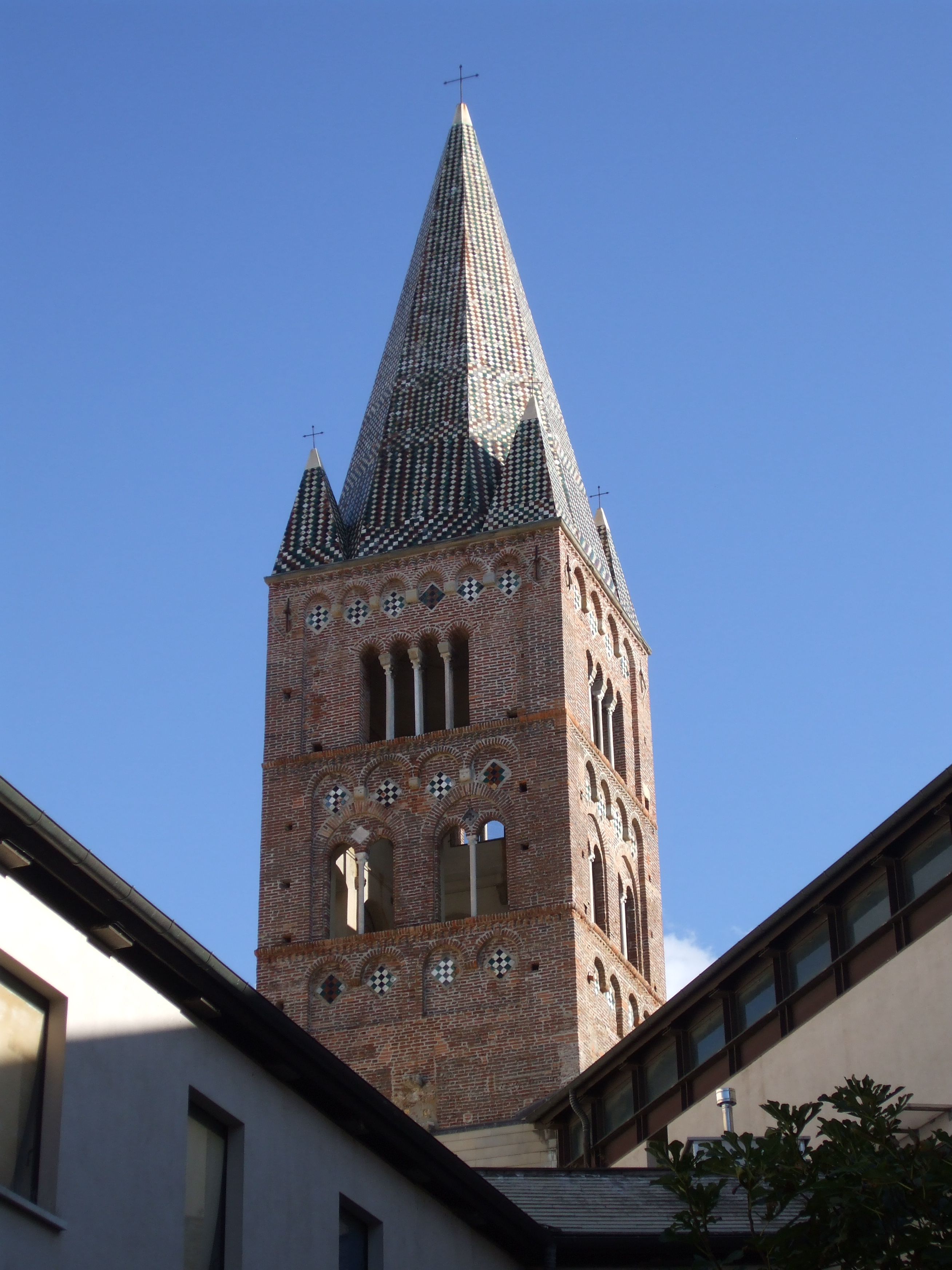 Foto scattata il giorno 11 novembre 2009 del campanile della ex-chiesa di sant'Agostino